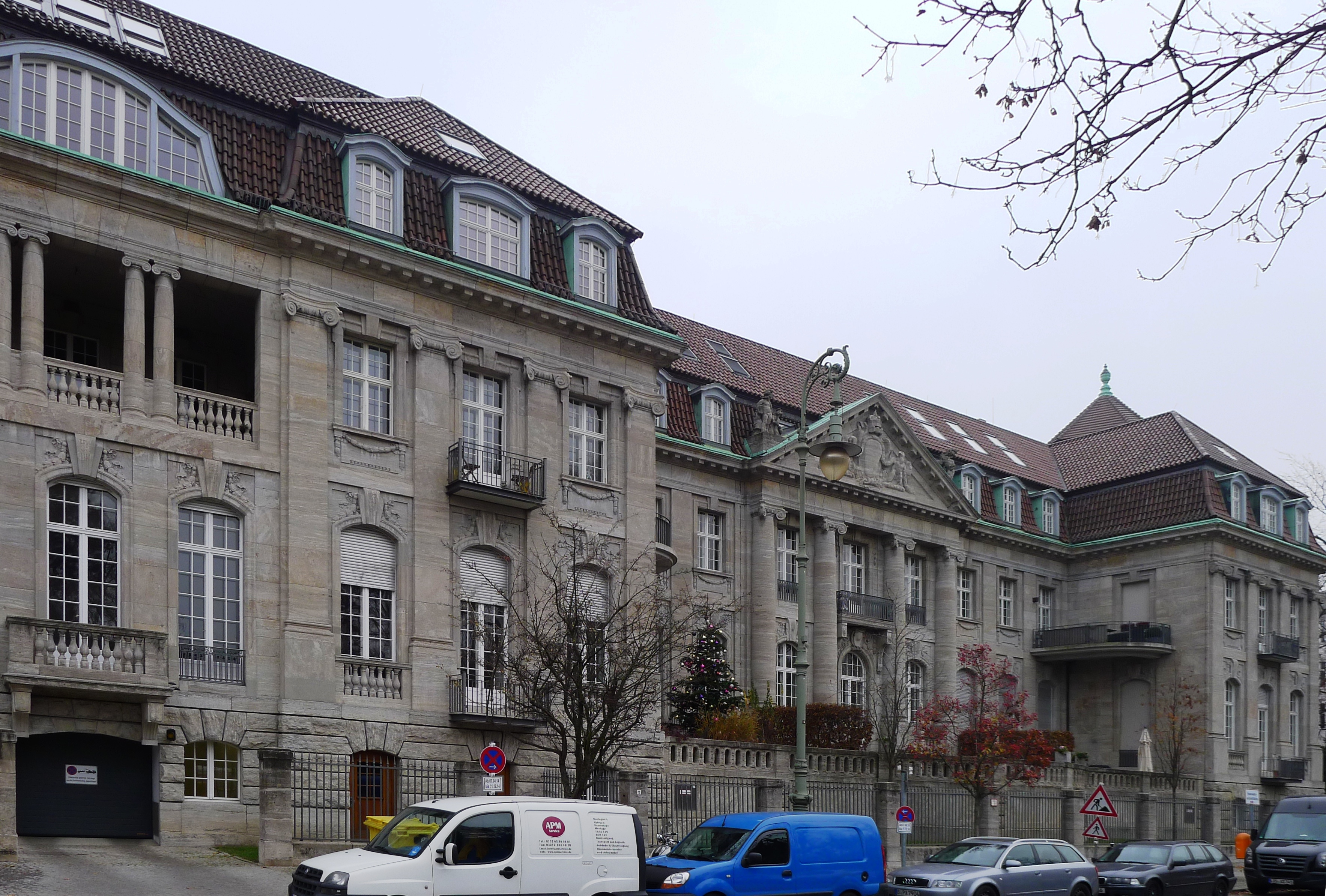 Wohngebäude mit Vorgarten